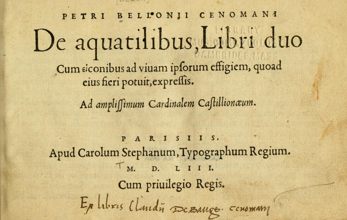 Pierre Belon, De aquatilibus, title page